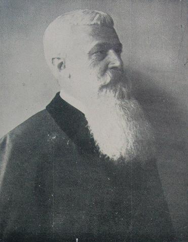 Retrato del ingeniero y arquitecto alemán Adolfo F. Büttner. Fundador de la Sociedad Central de Arquitectos de la Argentina.